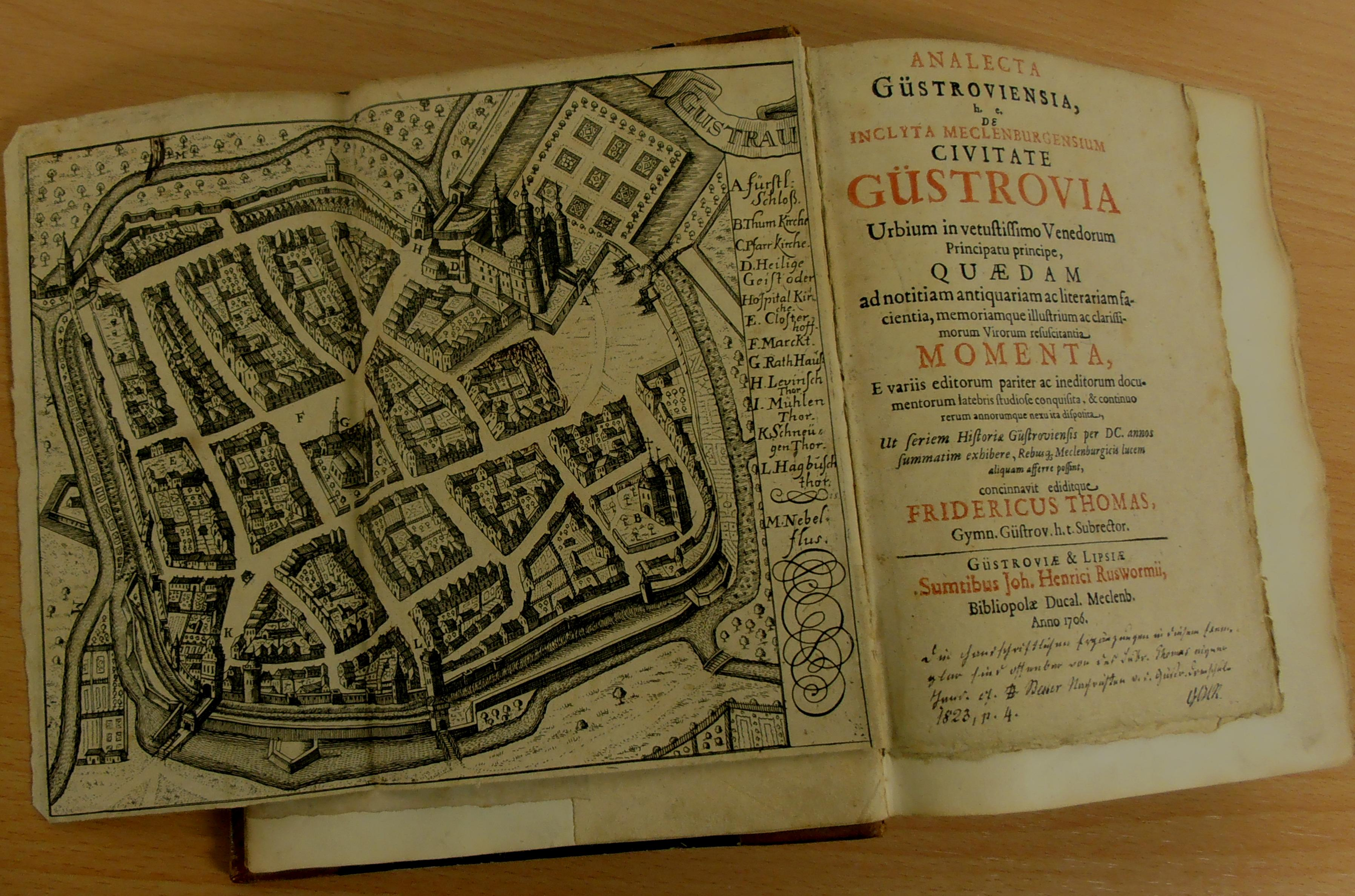 Thomac, Fridericus: Güstrovia von 1709